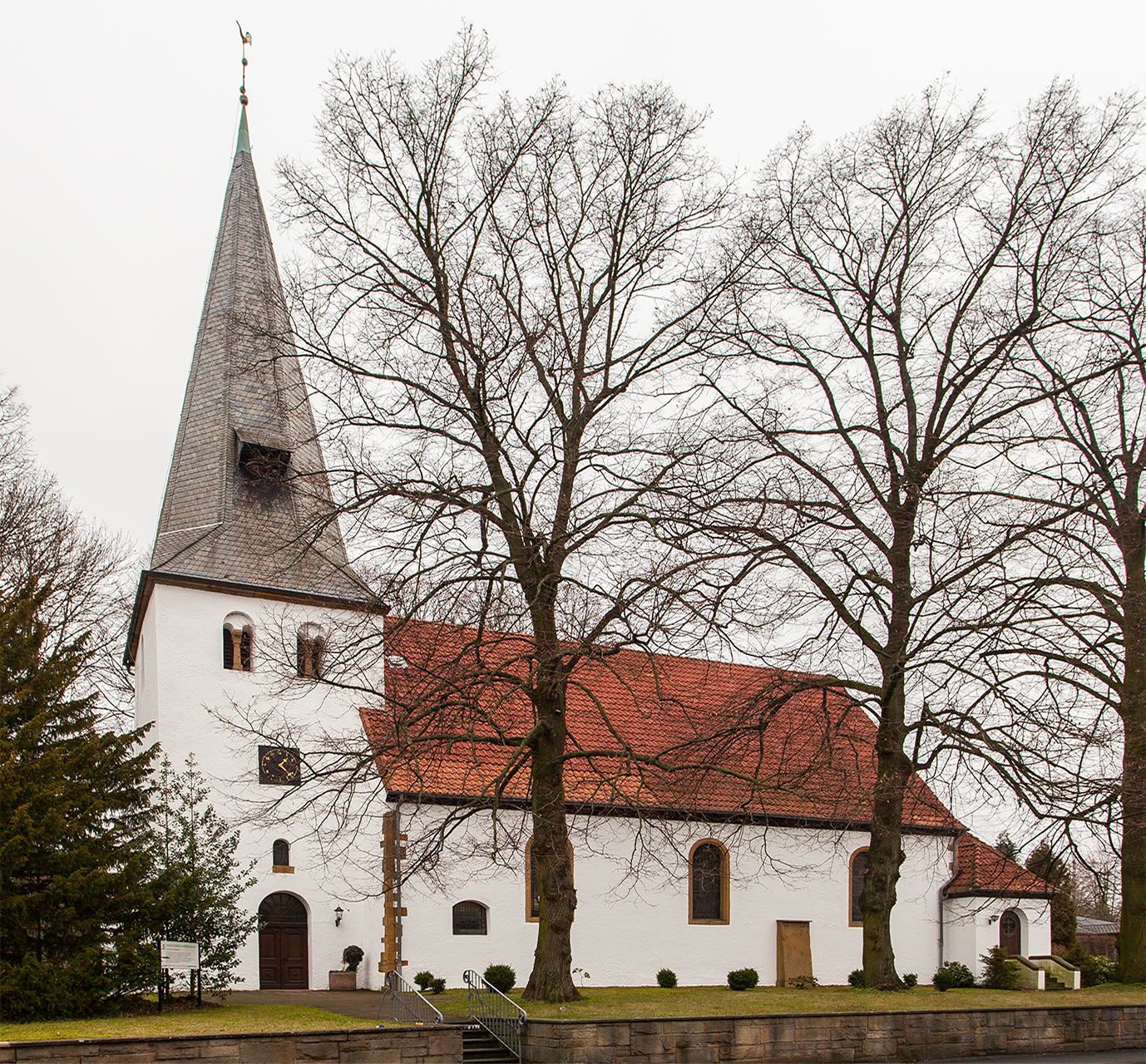 St. Gangolf in Hiddenhausen This is the photograph of an architectural monument. It is part of the list of cultural monuments of Hiddenhausen, no. 3